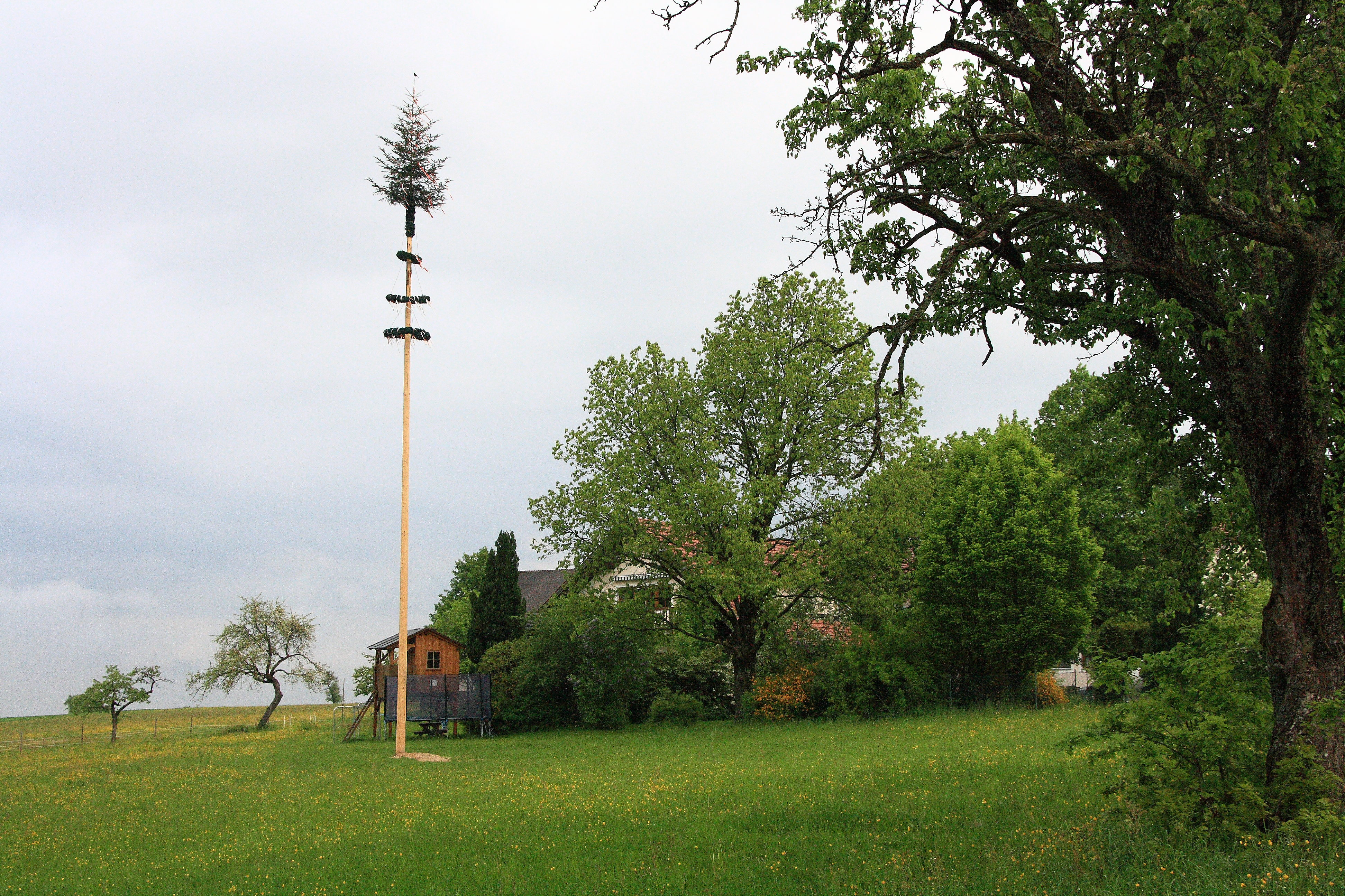 Der Maibaum in Hareth, 2013.